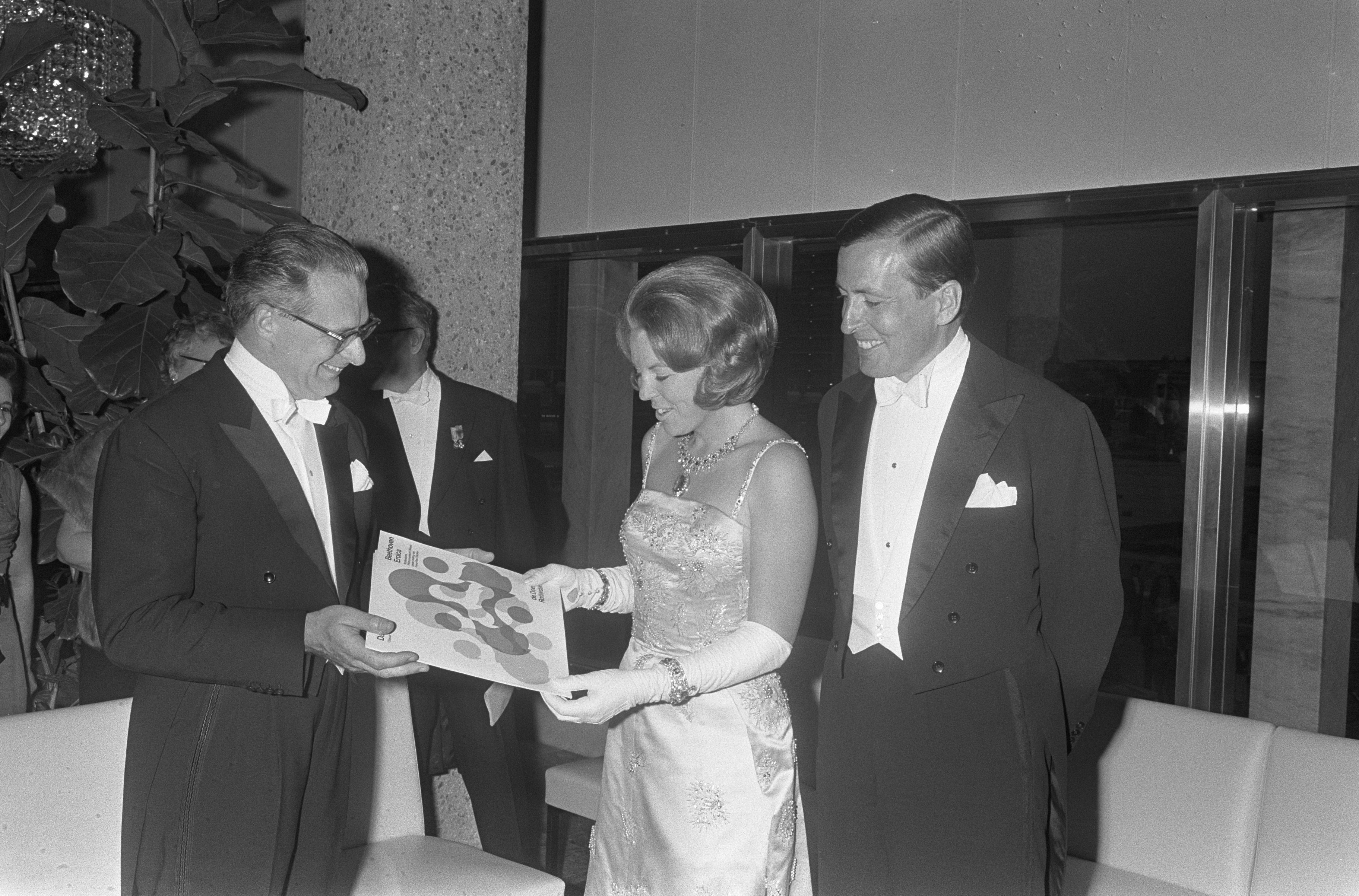 Collectie / Archief : Fotocollectie Anefo Reportage / Serie : [ onbekend ] Beschrijving : Holland Festival in De Doelen te Rotterdam van start Datum : 14 juni 1966 Locatie : Rotterdam, Zuid-Holland Persoonsnaam : Beatrix, prinses, Claus, prins Instellingsnaam : Doelen, De, Holland Festival Fotograaf : Koch, Eric / Anefo Auteursrechthebbende : Nationaal Archief Materiaalsoort : Negatief (zwart/wit) Nummer archiefinventaris : bekijk toegang 2.24.01.05 Bestanddeelnummer : 919-2480